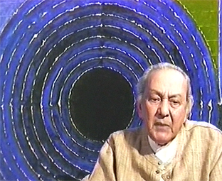 Portrait de Sayed Haider Raza